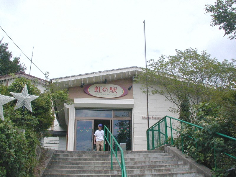 摩耶ロープウェー虹の駅